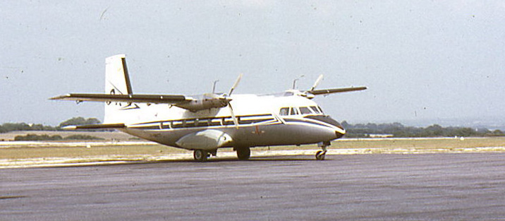 Nord 262 sur le parking de l'aéroport de Quimper-Cornouaille